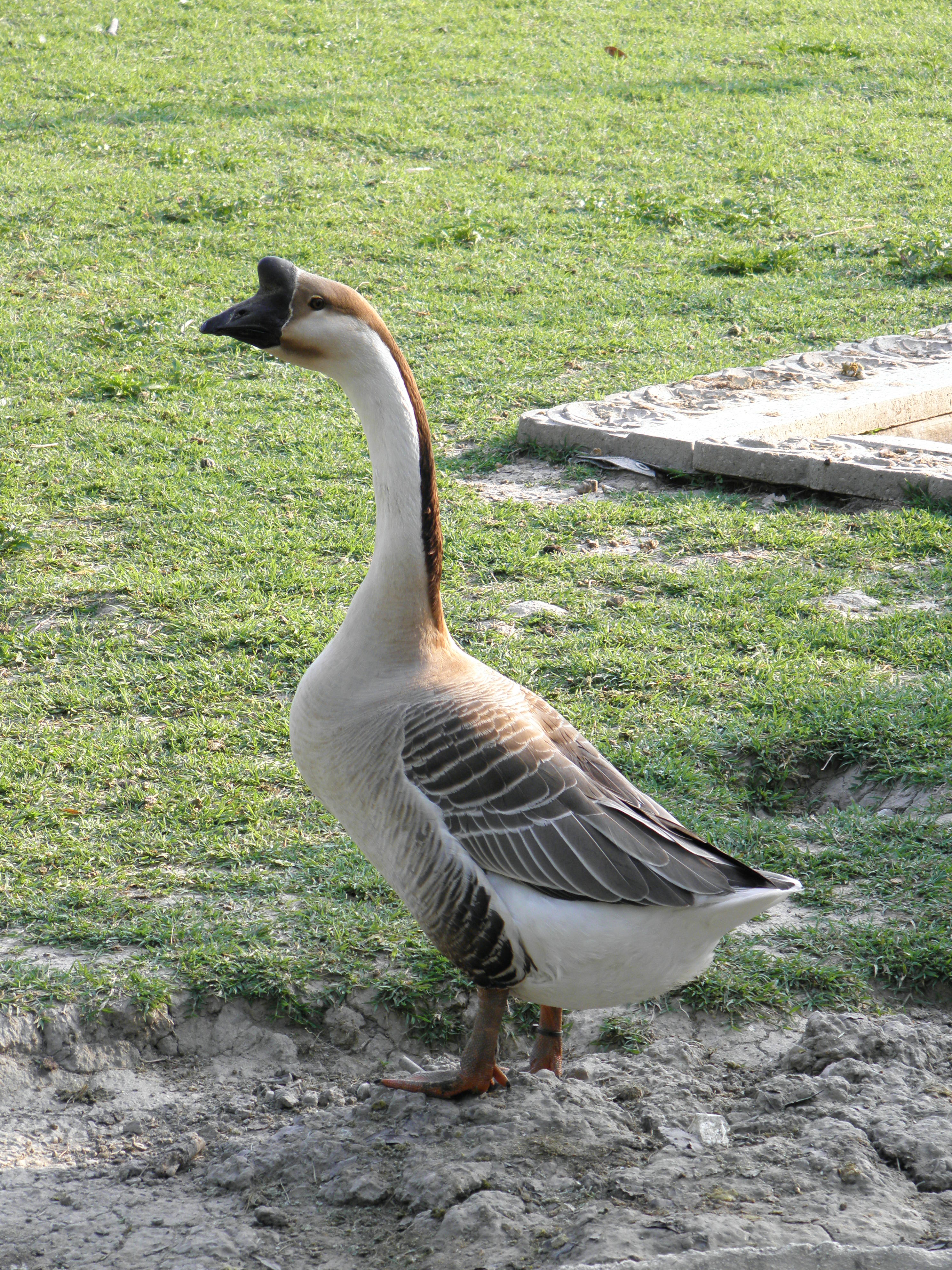 Rovigo: un'oca cignoide (Anser cygnoides) in cattività.